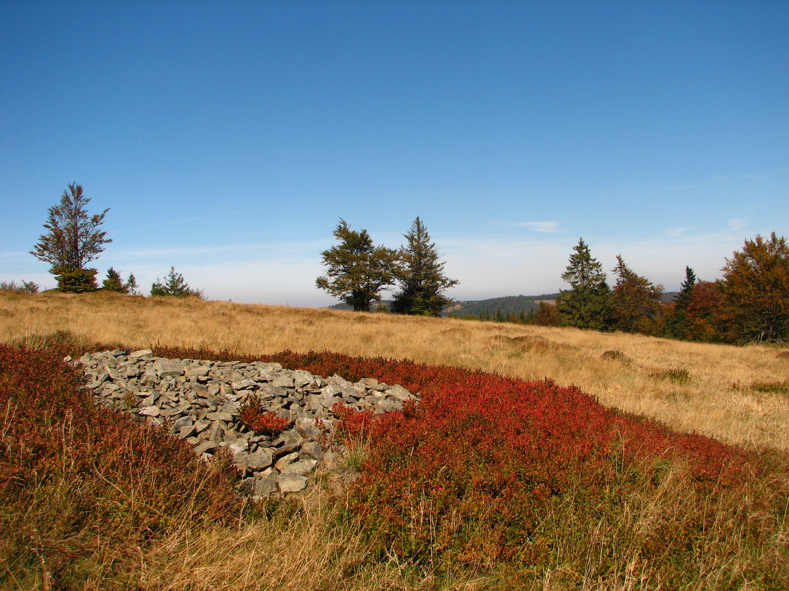 Polana Sucha na szczycie Suchej Góry (1040 m n.p.m.)